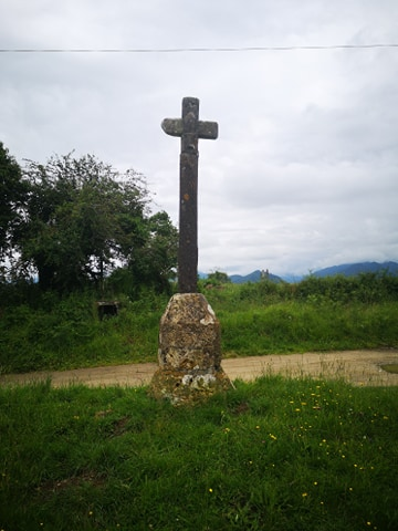 Croix au col de Catchaudégué (893 m) en juin 2020. Le col est situé en limite des communes d'Alos et de Sentenac-d'Oust en Ariège.